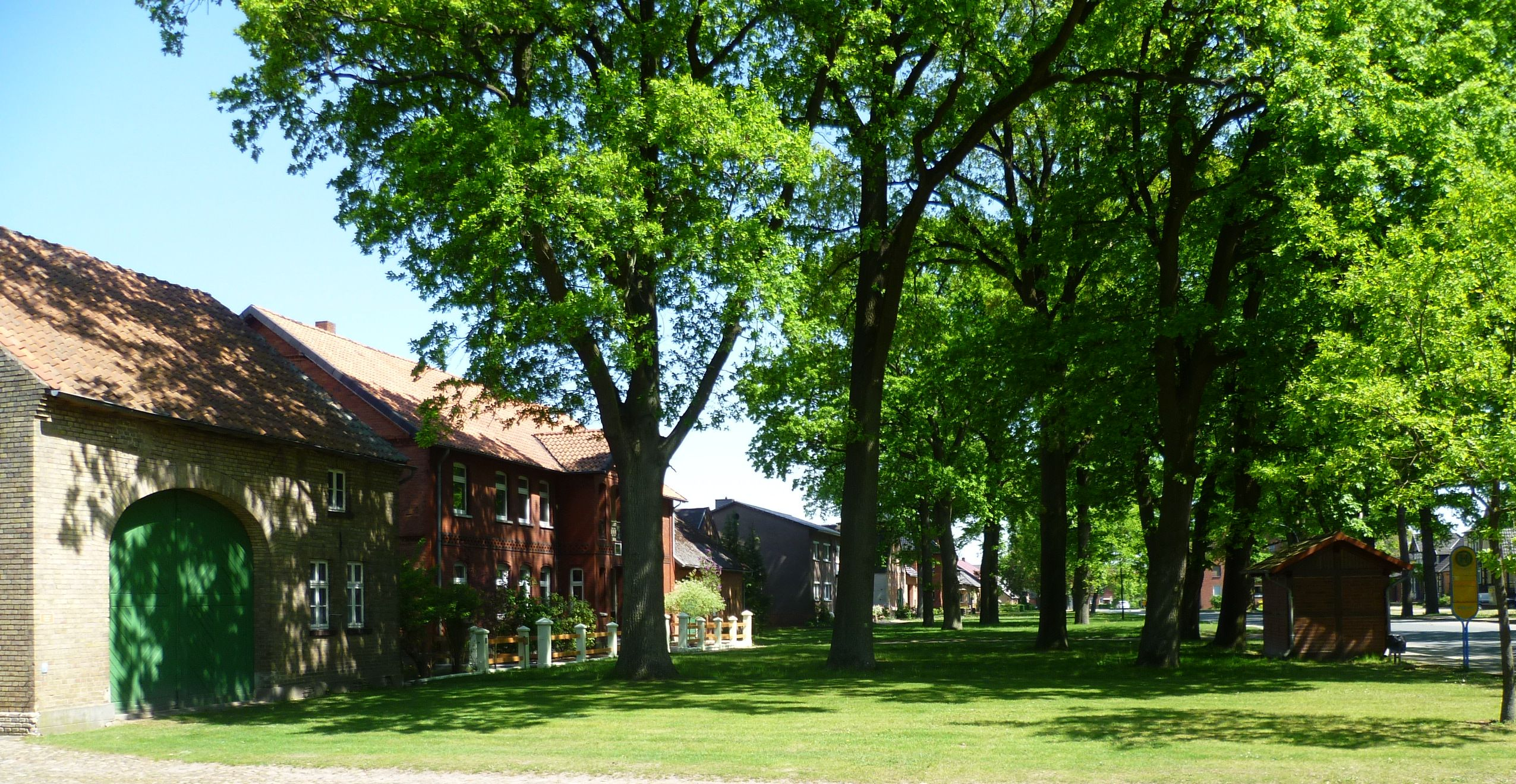 Dorfstraße in Zasenbeck Nordseite in Richtung Osten